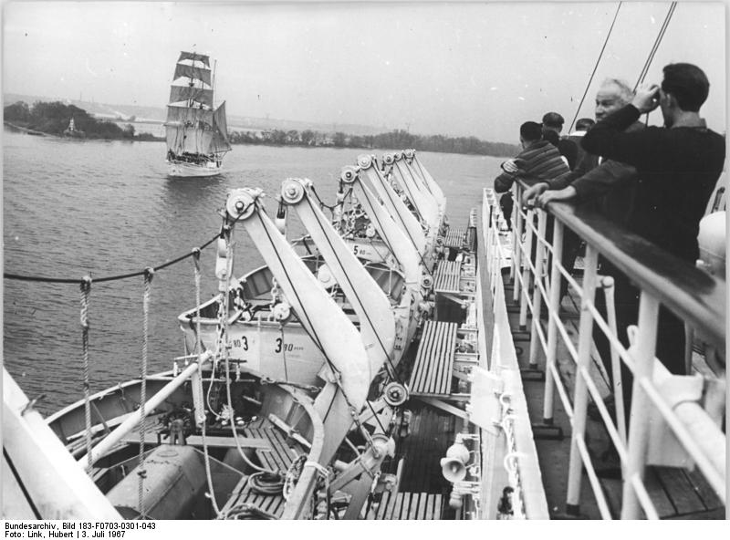 Zentralbild Link 3.7.1967 Urlaubsreisen mit der "Fritz Heckert" nach Leningrad. 368 Bürger der Deutschen Demokratischen Republik - von der Hausfrau, der Geflügelzüchterin, dem Neuerer, der Ärztin bis zum Vorsitzenden einer Landwirtschaftlichen Produktionsgenossenschaft - unternahmen im Jahr des Roten Oktober (50. Jahrestag der Oktoberrevolution) eine 13tätige Urlaubsreise des Freien Deutschen Gewerkschaftsbundes mit dem Turbinenmotorschiff "Fritz Heckert" nach Leningrad, der Wiege der sozialistischen Revolution. Im zweiten Weltkrieg erlebte Leningrad durch die 900 Tage dauernde Belagerung der Faschisten (1942-44) die Schwersten Jahre seiner Geschichte. Aus Ruinen wieder auferstanden ist die Newastadt heute Anziehungspunkt für Touristen aus aller Welt. Erholsame aber auch abwechslungsreiche Stunden an Bord und erlebnisreiche Tage in den Städten Gdynia, Sopot, Gdansk und Riga werden den Urlaubern in unvergeßlicher Erinnerung bleiben. Beim Auslaufen aus dem Hafen von Riga, der Hauptstadt der Lettischen SSR, begegnete die "Fritz Heckert" dem Segelschulschiff "Kapella".